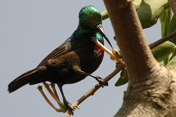 Mariqua Sunbird, Nectarinia mariquensis, in Uganda